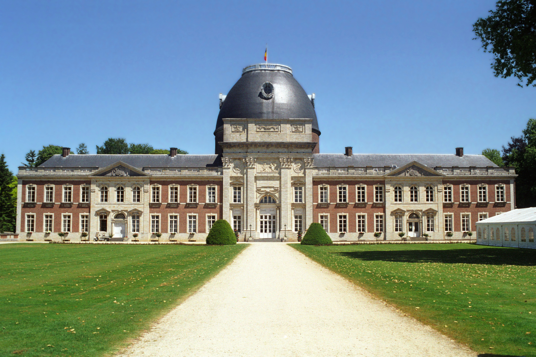 Belgique - Wallonie - Abbaye d'Hélécine